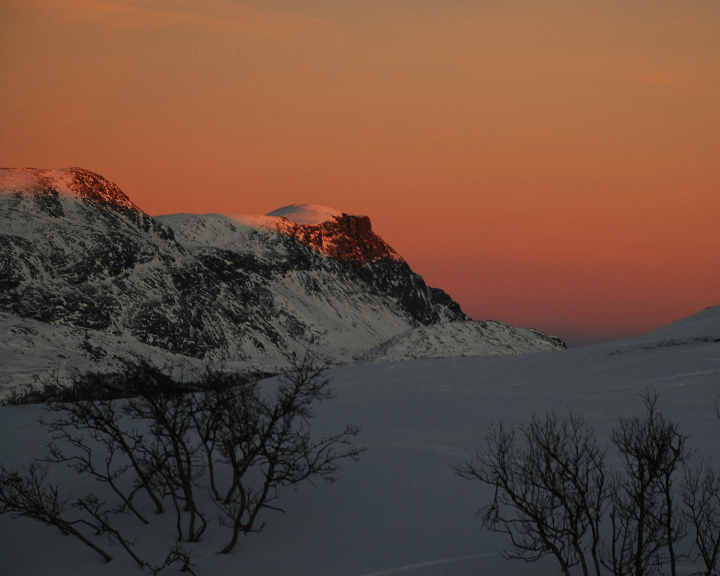 Skogshorn i solnedgang (9317)